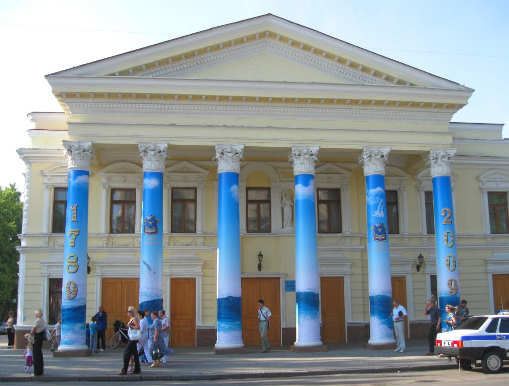 Російський драматичний театр у Миколаєві